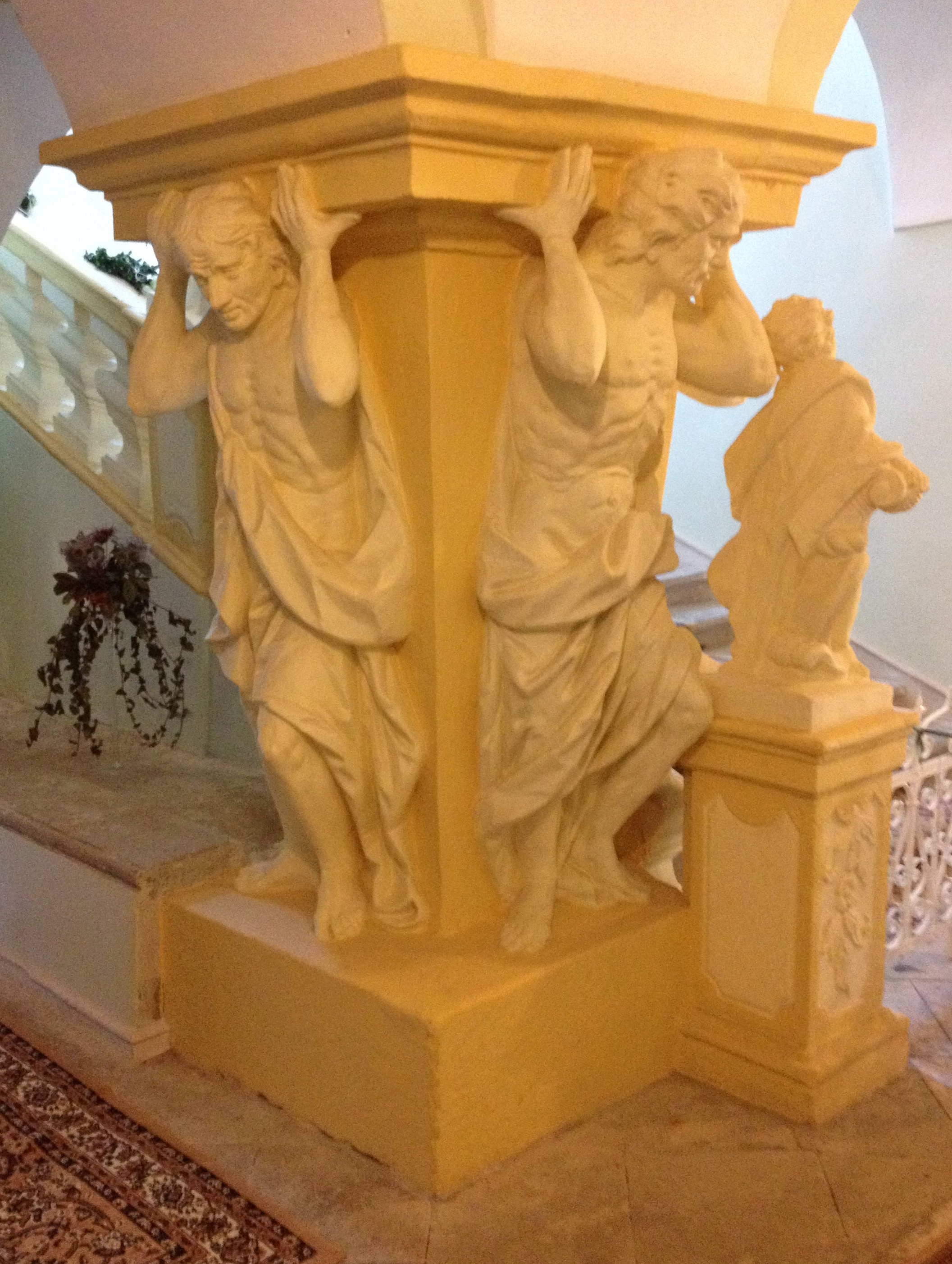 Atlanti